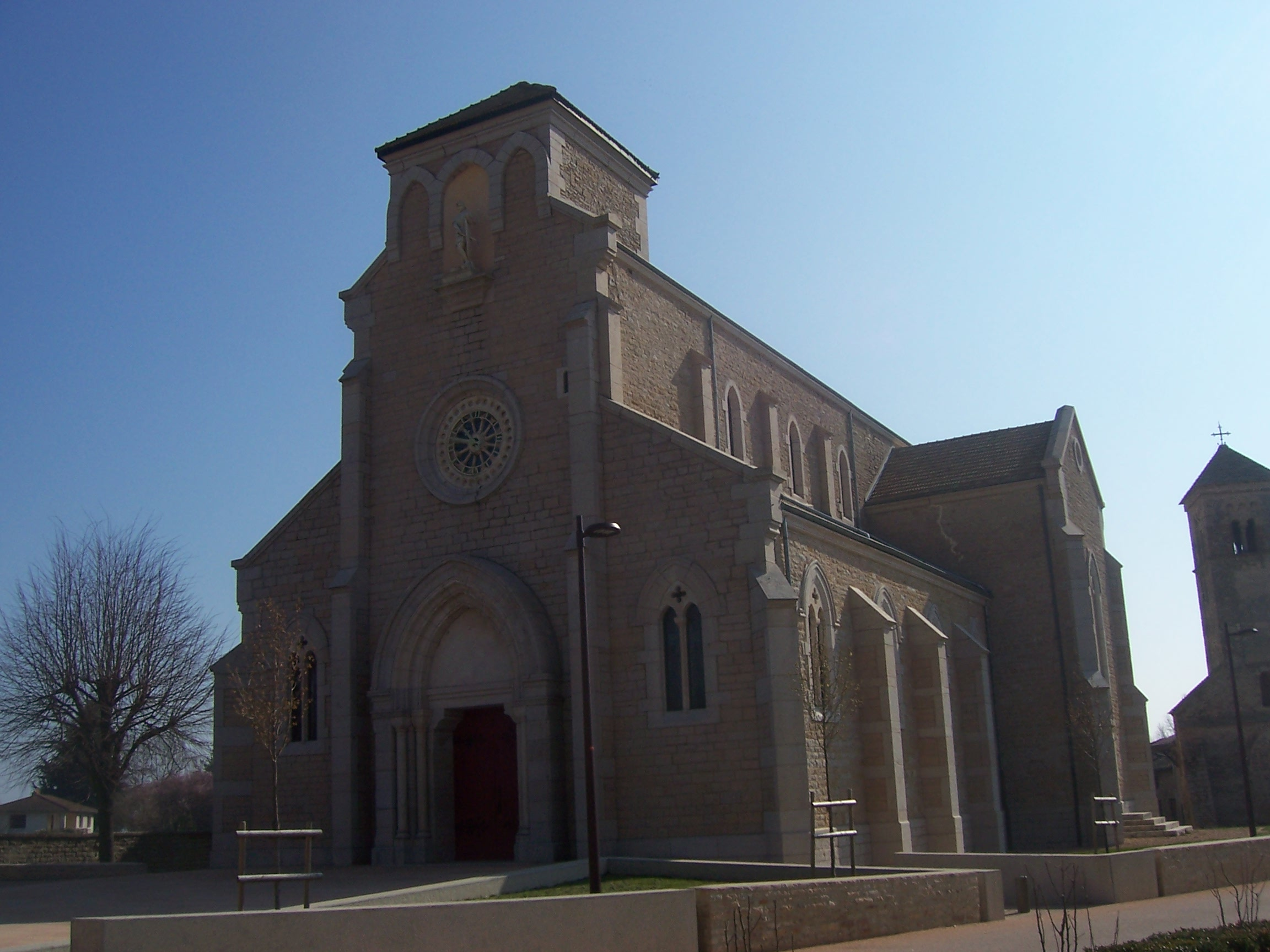 Eglise de Saint-Martin-Belle-Roche